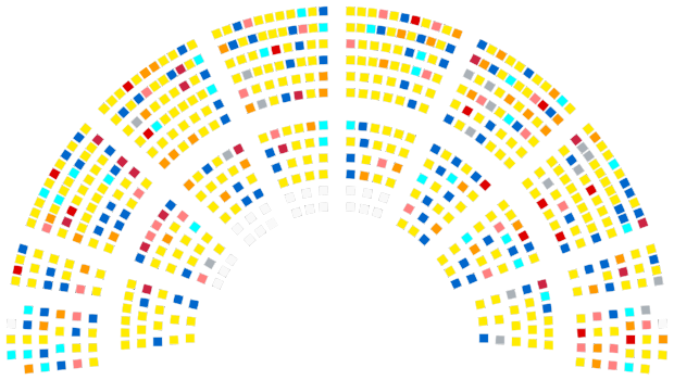 21 juin 2017 - 30 juin 2017 REM (314) LR (100) MoDem (47) LC (35) NG (31) FI (17) GDR (16) Non inscrits (17)